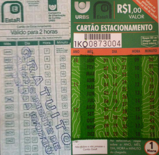 Montagem - Cartões do EstaR de Curitiba - branco é da década de 1980 e verde da década de 2010